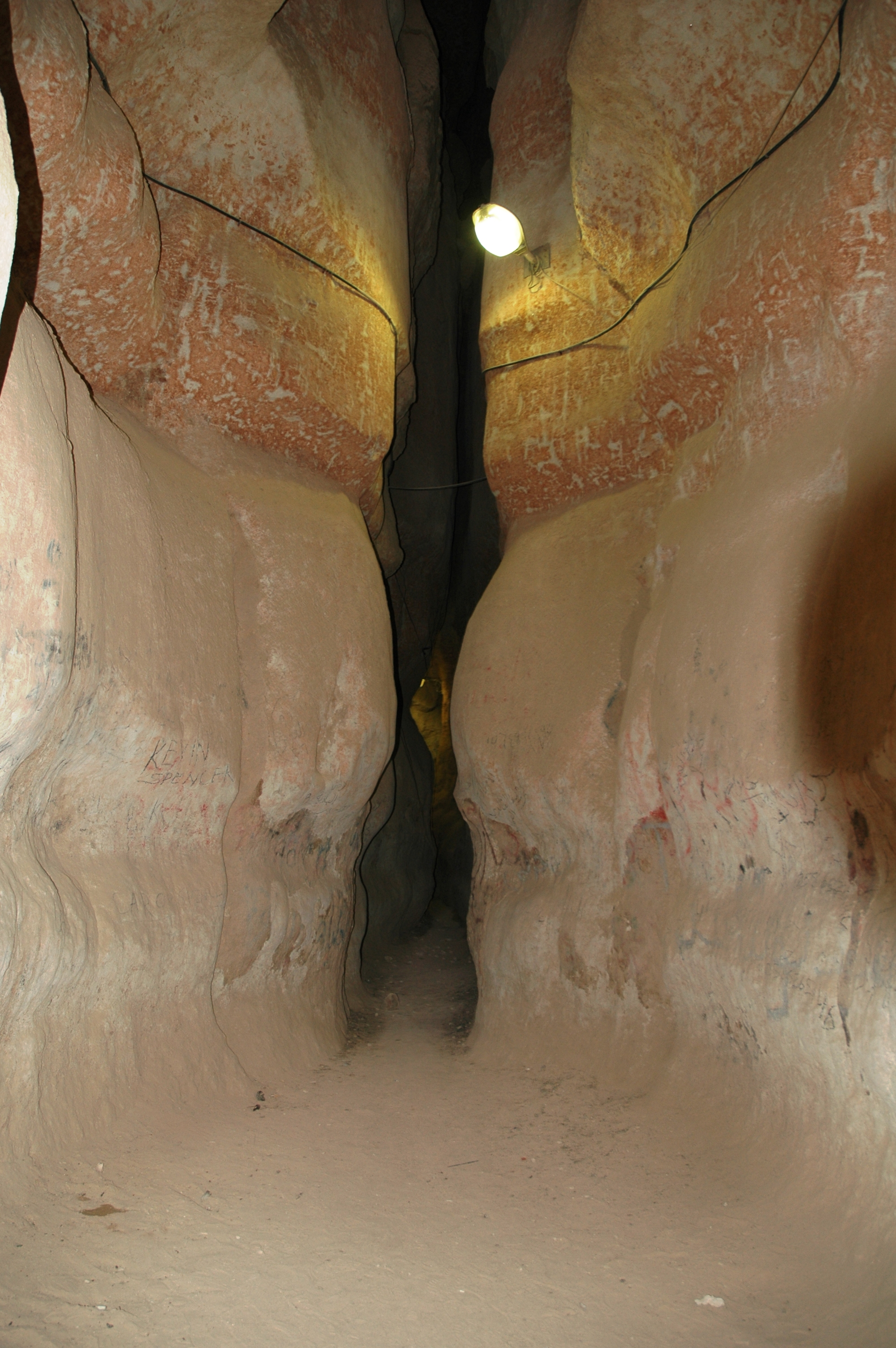 ജബൽ അൽഗാര ഗുഹകളുടെ ഒരു ഉൾവശം